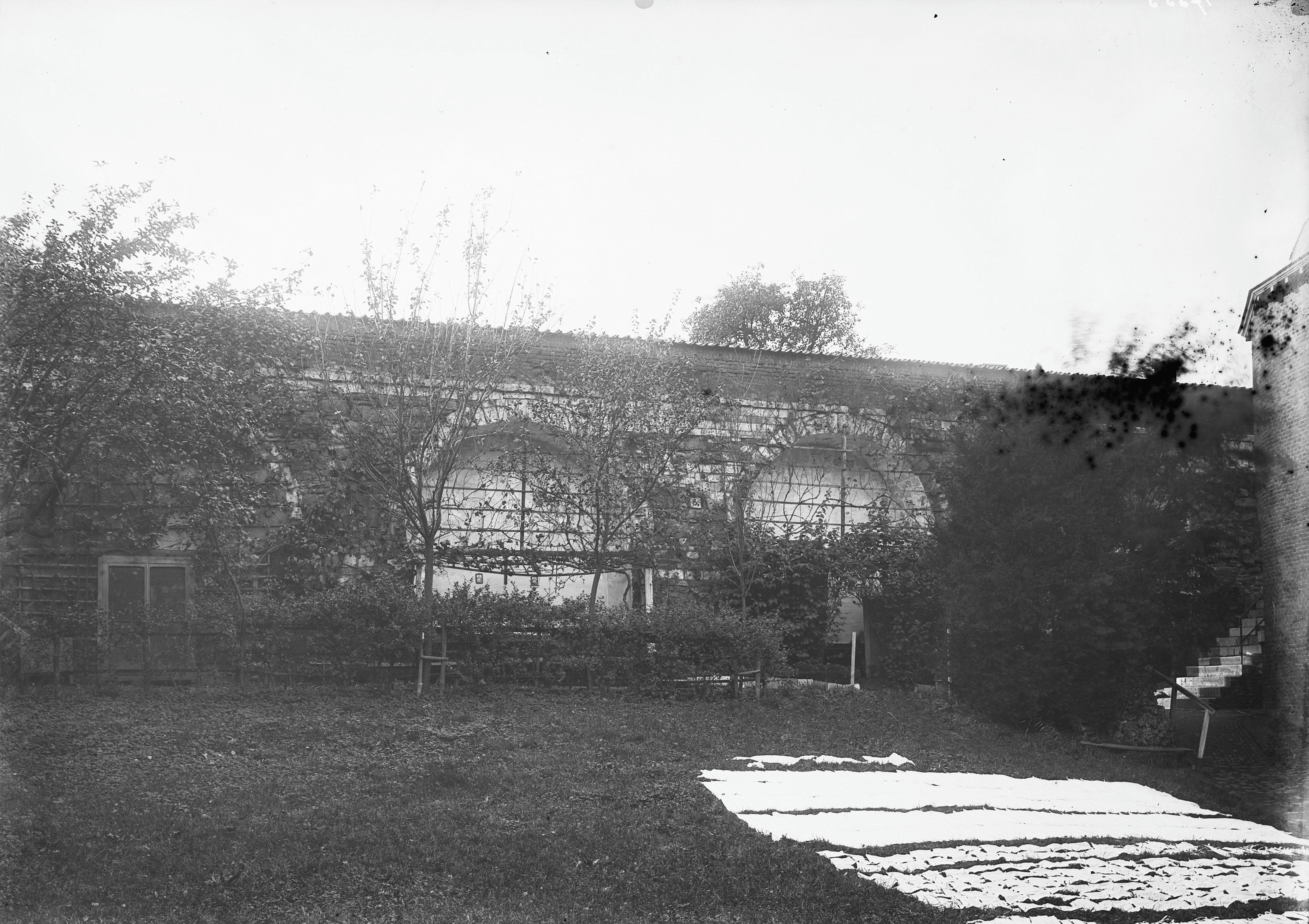 Vestingwerken: oude walmuur in de tuinen van de zusters onder de bogen This is a possible Rijksmonument: Find the monument in the Monuments database: Waldeckpark in Maastricht All Rijksmonumenten in Maastricht Is this a Rijksmonument? Yes No More information about this project and help. More images to work at in Category:Possible Rijksmonumenten.